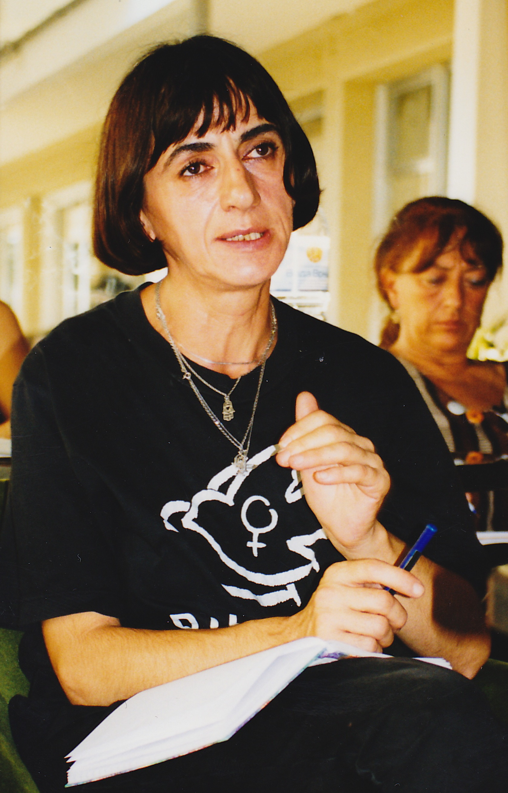 IX Encuentro Internacional de Mujeres de Negro. Ulcinj, Montenegro. Septiembre-Octubre - 1999